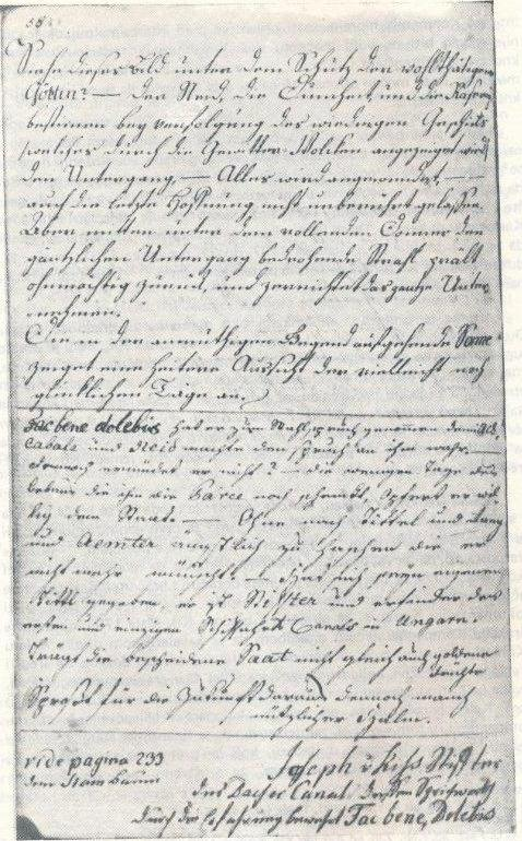 Српски (ћирилица): Јожеф Киш, Забелешка уз аутопортрет из његовог споменара који се налази у Државној Сечењијевој библиотеци (Országos Szécsény Könyvtár) у Будимпешти. На средини странице се запажа латинска изрека "Fac bene, dolebis" (Чини добро, зажалићеш.), коју је Јожеф Киш истакао као девизу, разочаран незахвалношћу савременика.